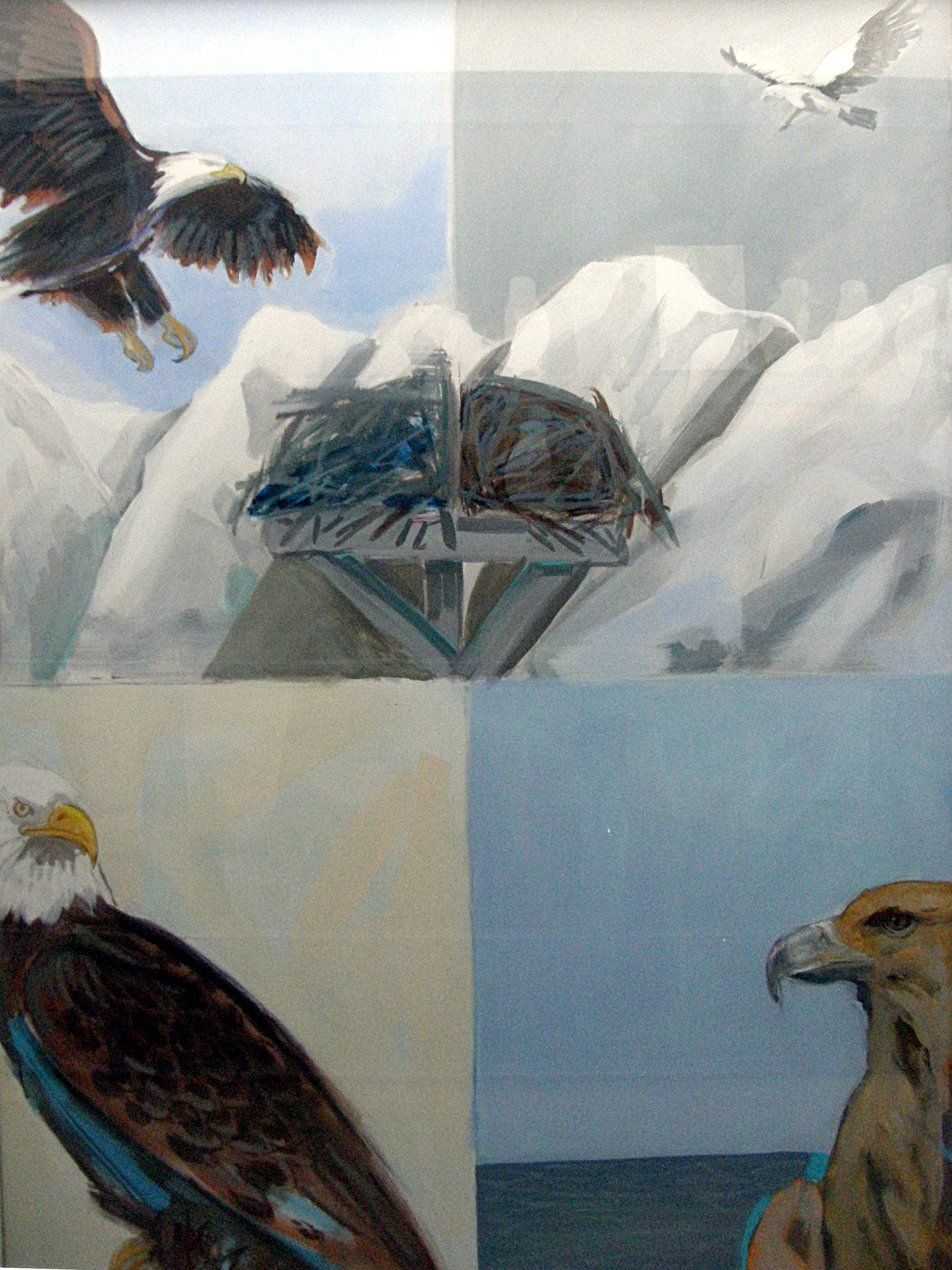 Wandbild in der Oranienstraße, Kita, Lichthof. Panoramafreiheit